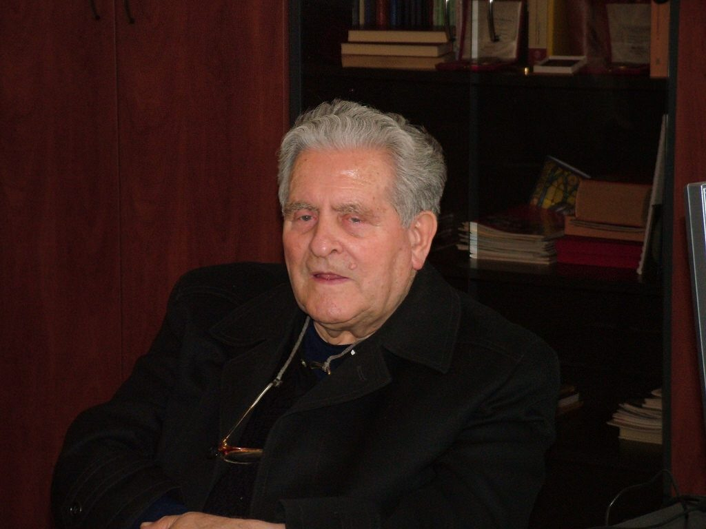 Piaristia Páter Jozef Horvátik